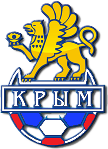 Емблема Федерації футболу АР Крим після анексії Росією